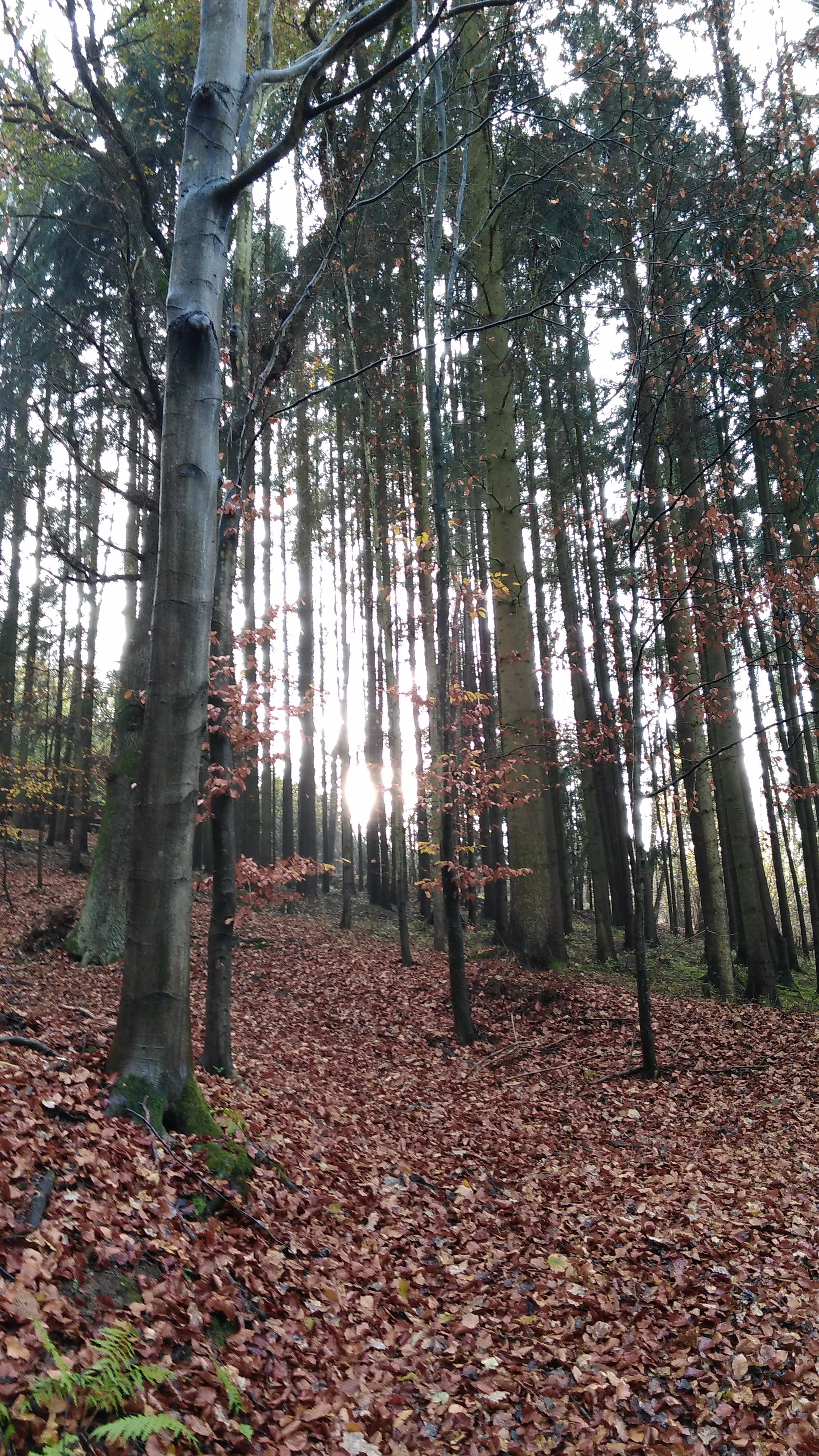 Smíšený les v okolí obce Křivá Ves